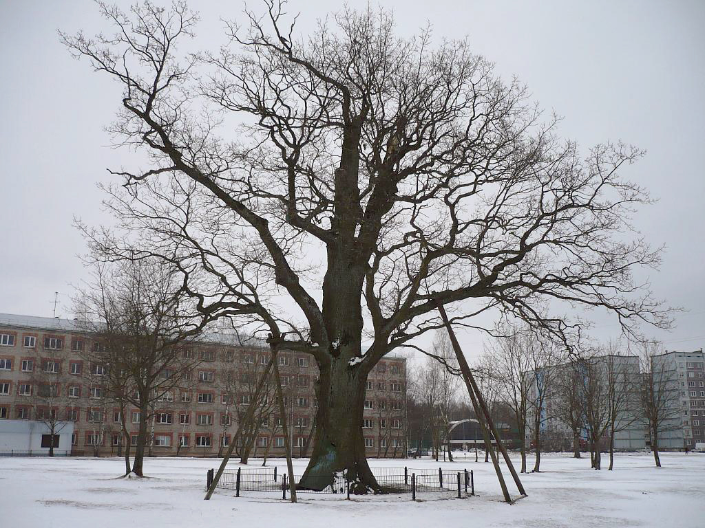 Rīga, Ēbeļmuižas ozols. 2009-03-01